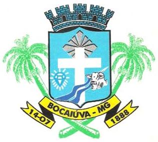 Brasão do município de Bocaiúva, estado de Minas Gerais, Brasil.